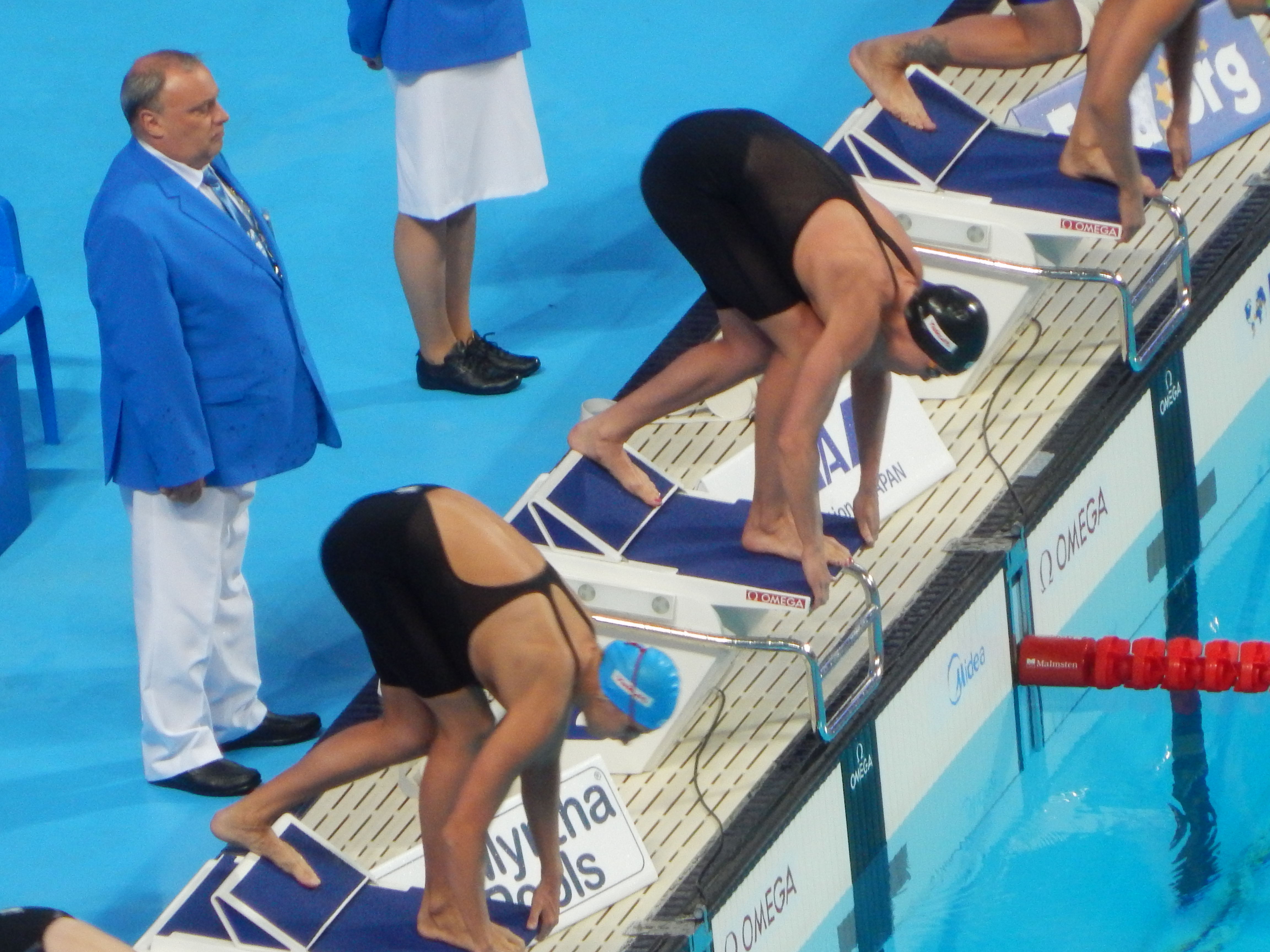 Вероника Попова и Фемке Хемскерк в полуфинале 200 м вольным стилем в Казани